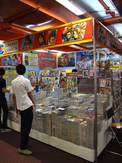 บูธสำนักพิมพ์สำนักพิมพ์บุรพัฒน์